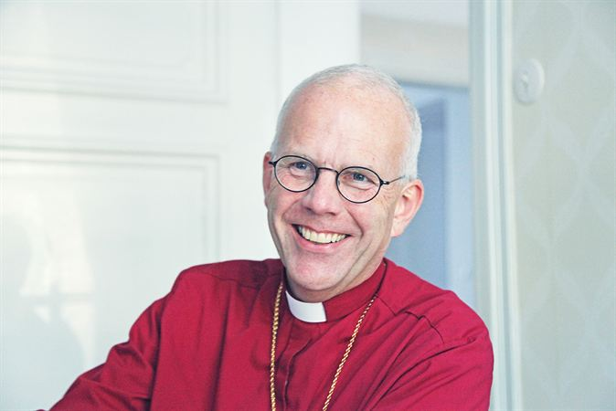 Biskop Martin Modéus, Linköping. Bilden tagen 2015.